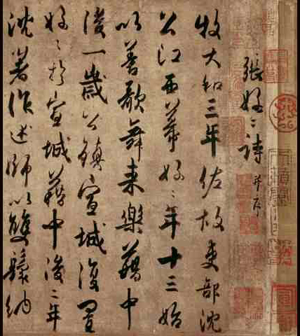 杜牧张好好诗局部